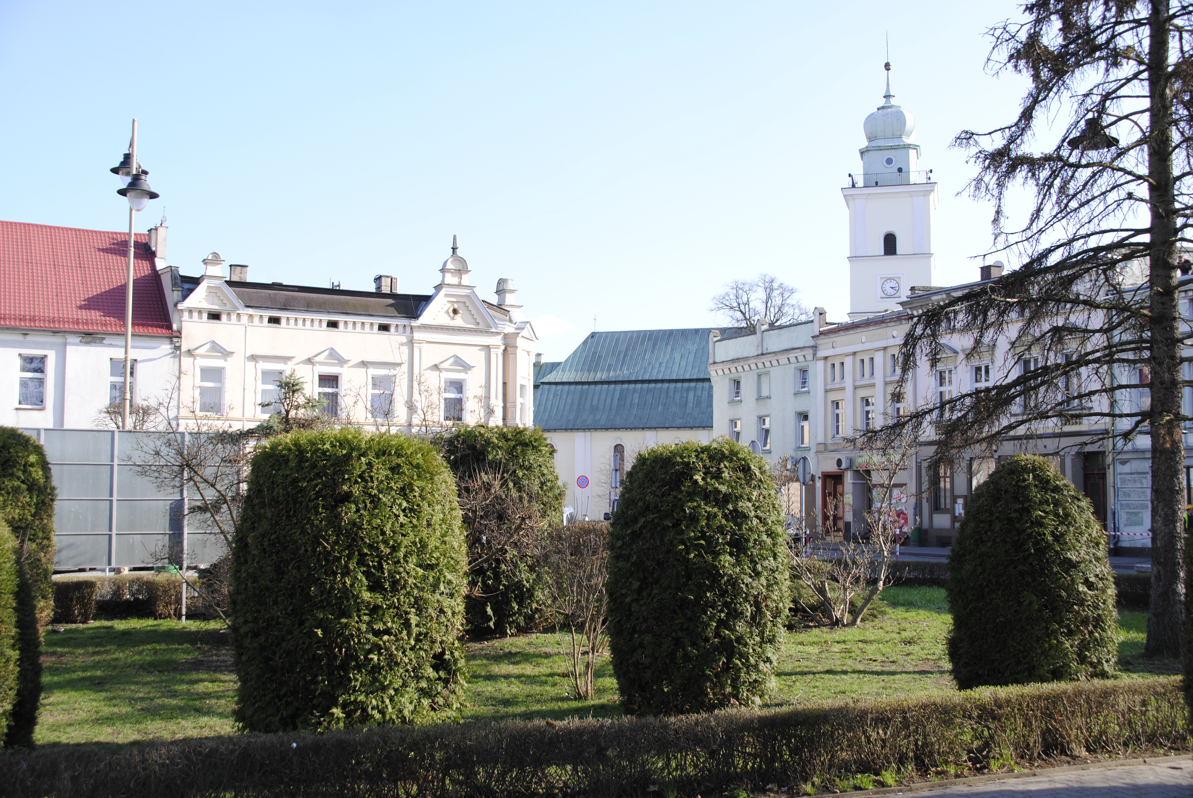 Ring mit Theresia-von-Lisieux-Kirche in Konstadt Oberschlesien